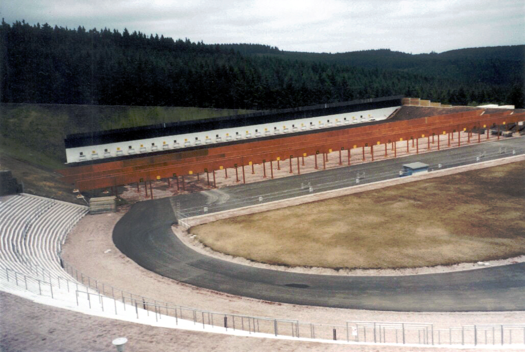 Oberhof, Rennsteig-Arena